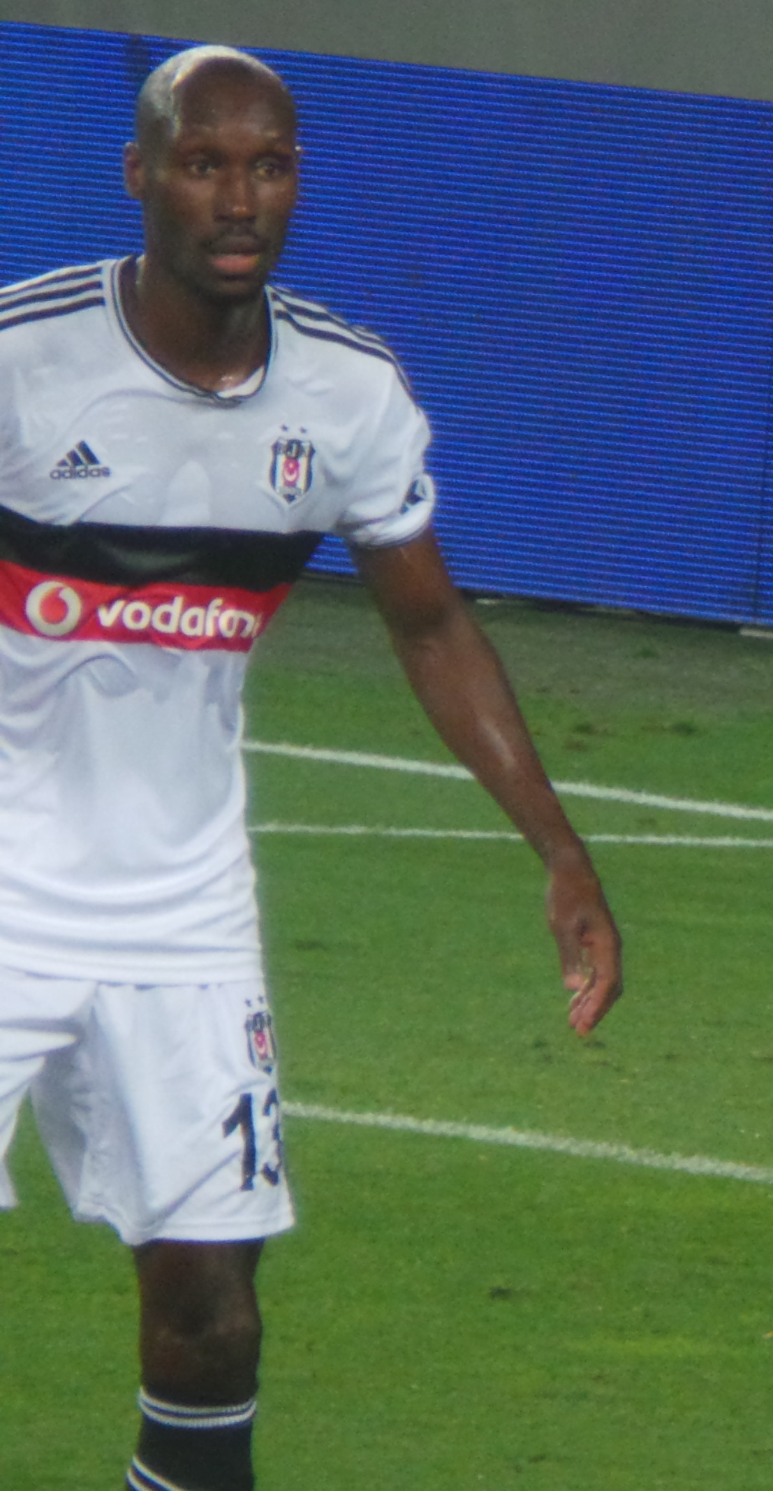 Atiba Hutchinson'14